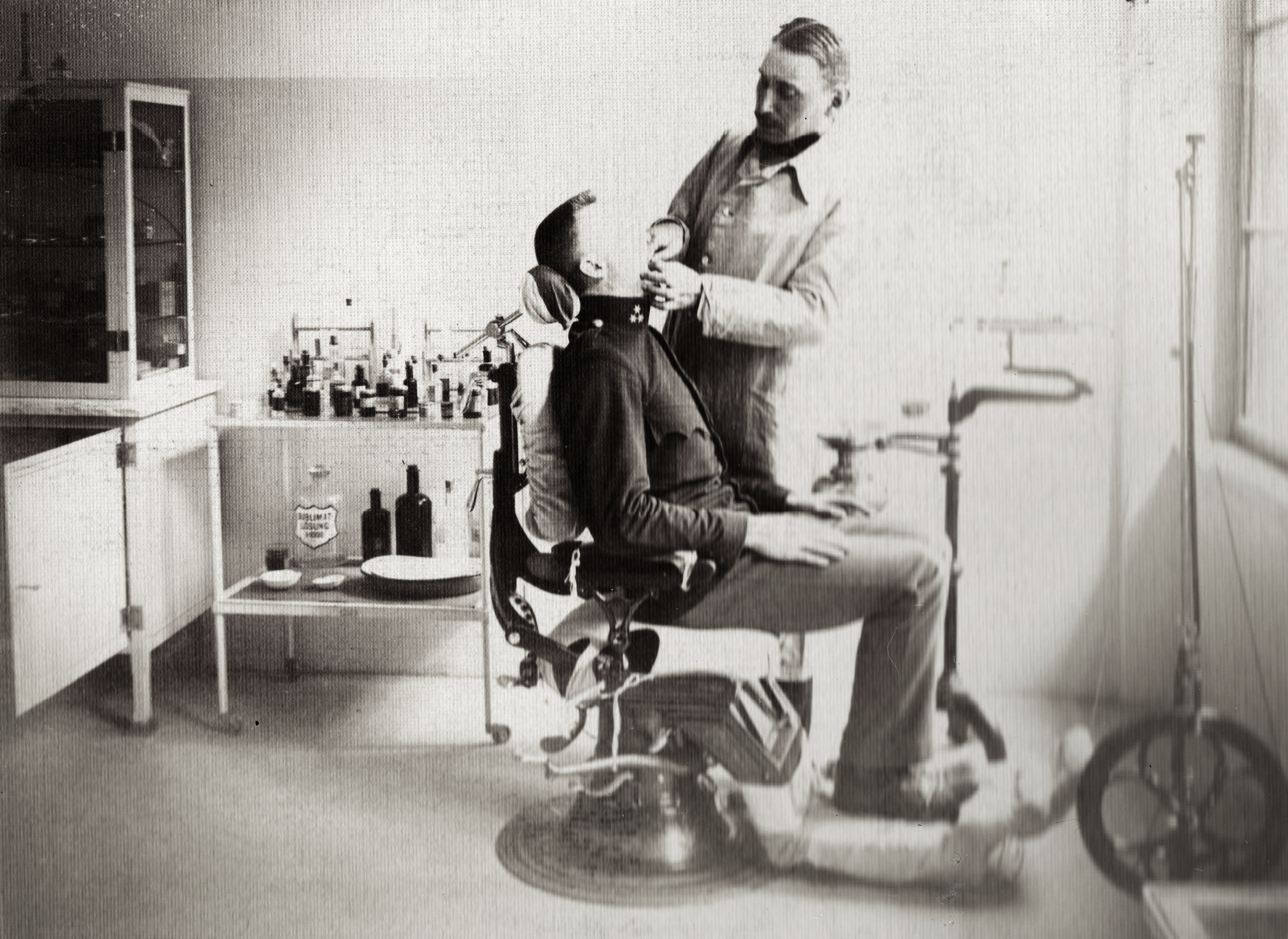 Császári és Királyi Katonai Főreáliskola (ma Martin Kaszárnya), fogászat. Location: Austria, Eisenstadt Tags: dentist, doctor's office, dentist Title: Császári és Királyi Katonai Főreáliskola (ma Martin Kaszárnya), fogászat.